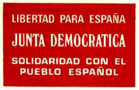 Cartel de la Junta Democrática de España1974